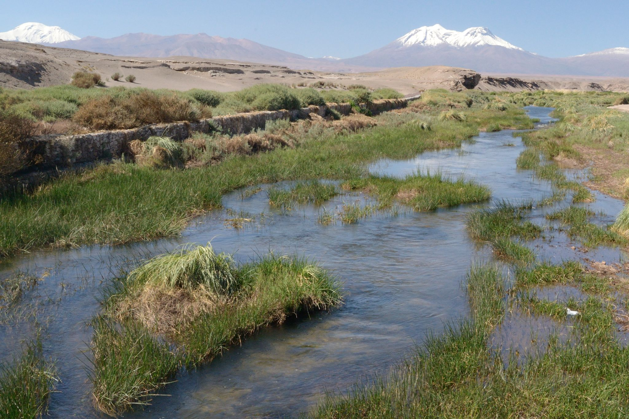 Ubicado en el altiplano chileno, rumbo a Caspana.